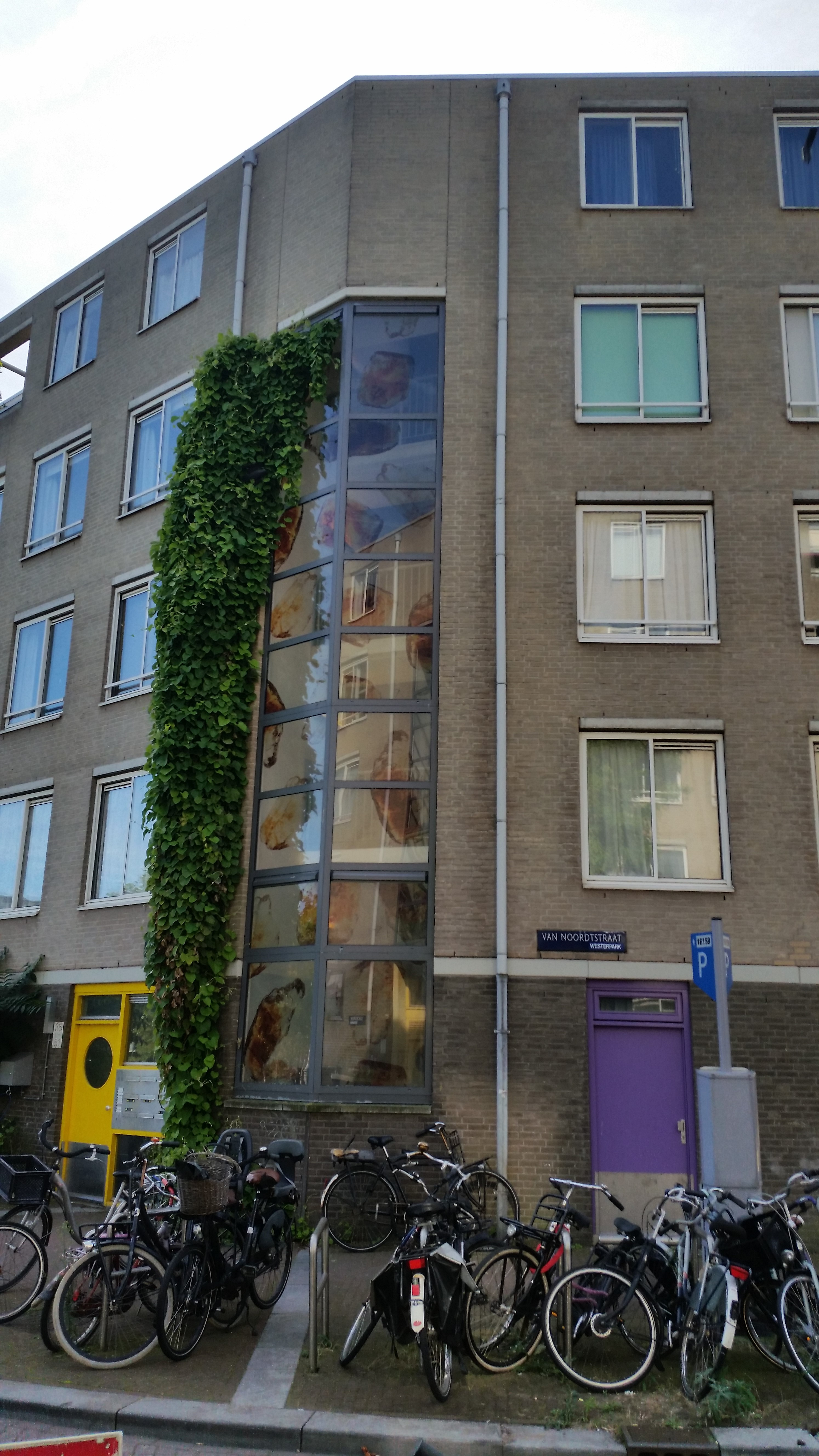 Van Noordtstraat, Amsterdam 1 bij paarse deur